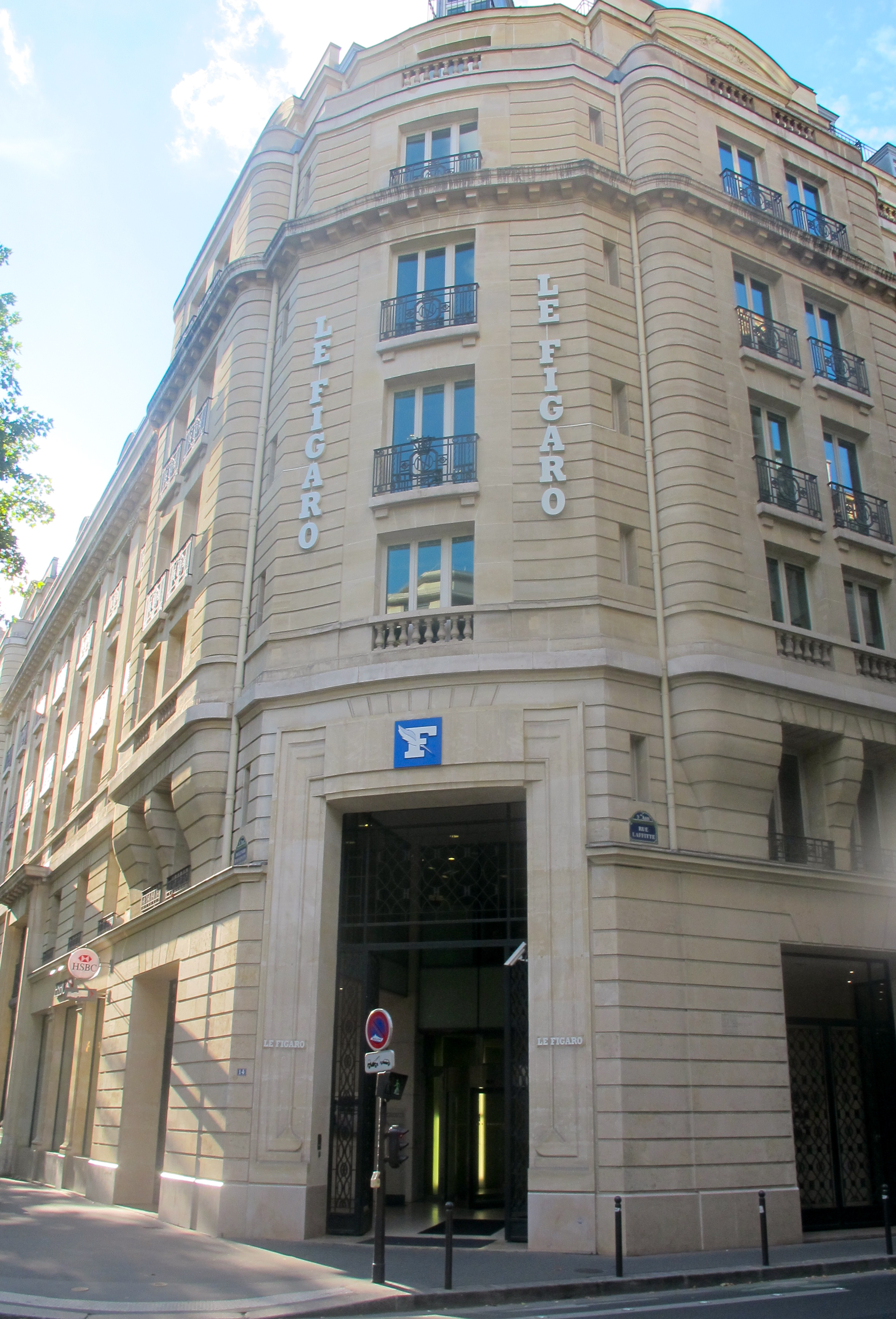 Siège du Figaro, au 14 boulevard Haussmann à Paris, Ecke Rue Lafitte.